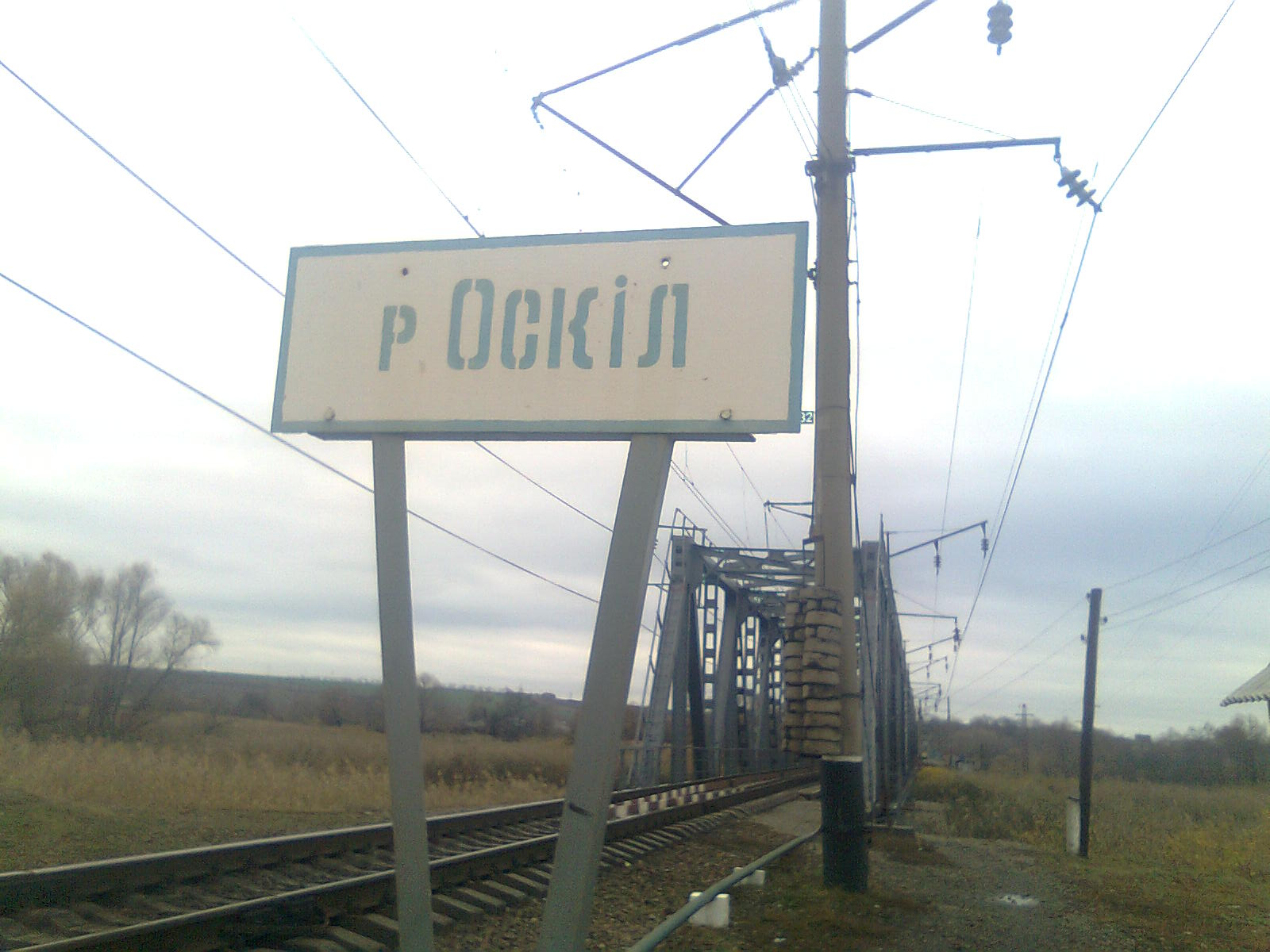 Знак перед р. Оскіл.